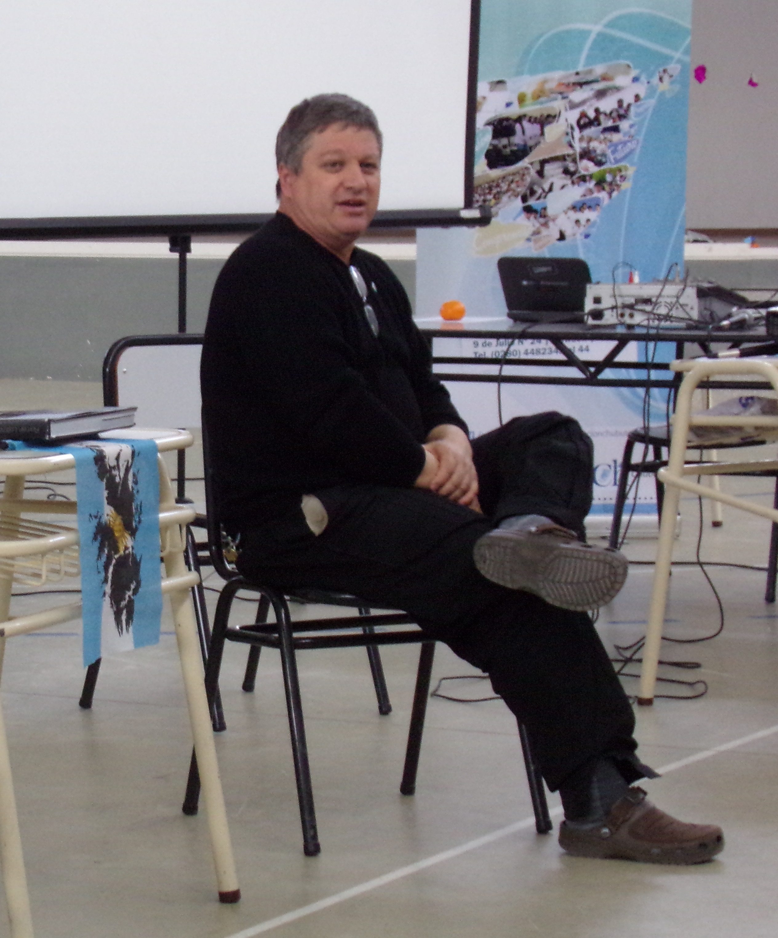 Milton Rhys fue un veterano de la Guerra de Malvinas descendiente de colonos galeses de Chubut. Se desempeñó como traductor y operador de radio en la Casa de Gobierno de Puerto Argentino, Islas Malvinas.